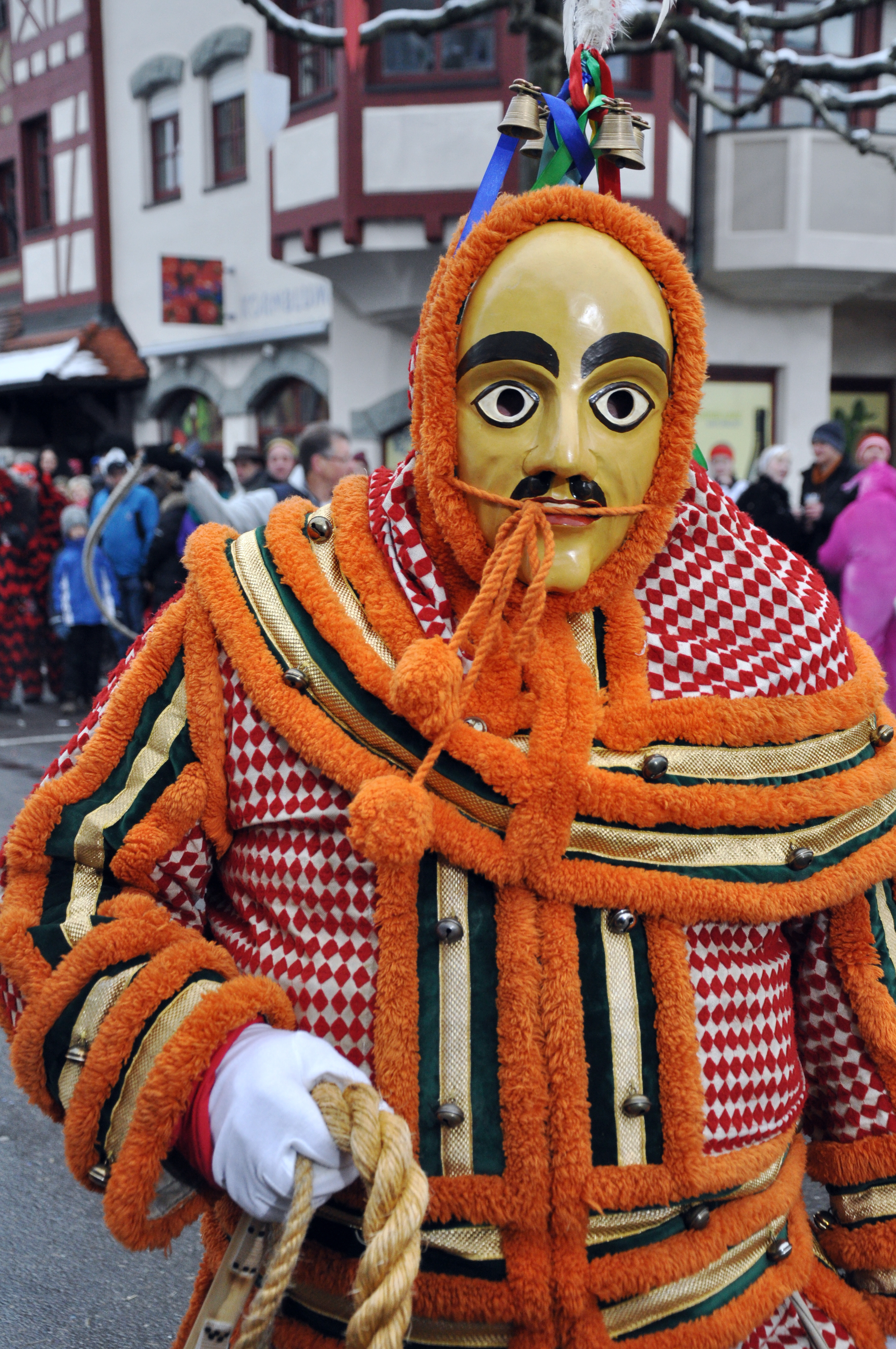 Teilnehmer der Schneller-WM: Fasenickl Kipfenberg (Altmühltal, Oberbayern) Fotografiert beim Landschaftstreffen der Vereinigung Schwäbisch-Alemannischer Narrenzünfte (VSAN) 2015 in Weingarten; Narrensprung am Sonntag, 25. Januar 2015